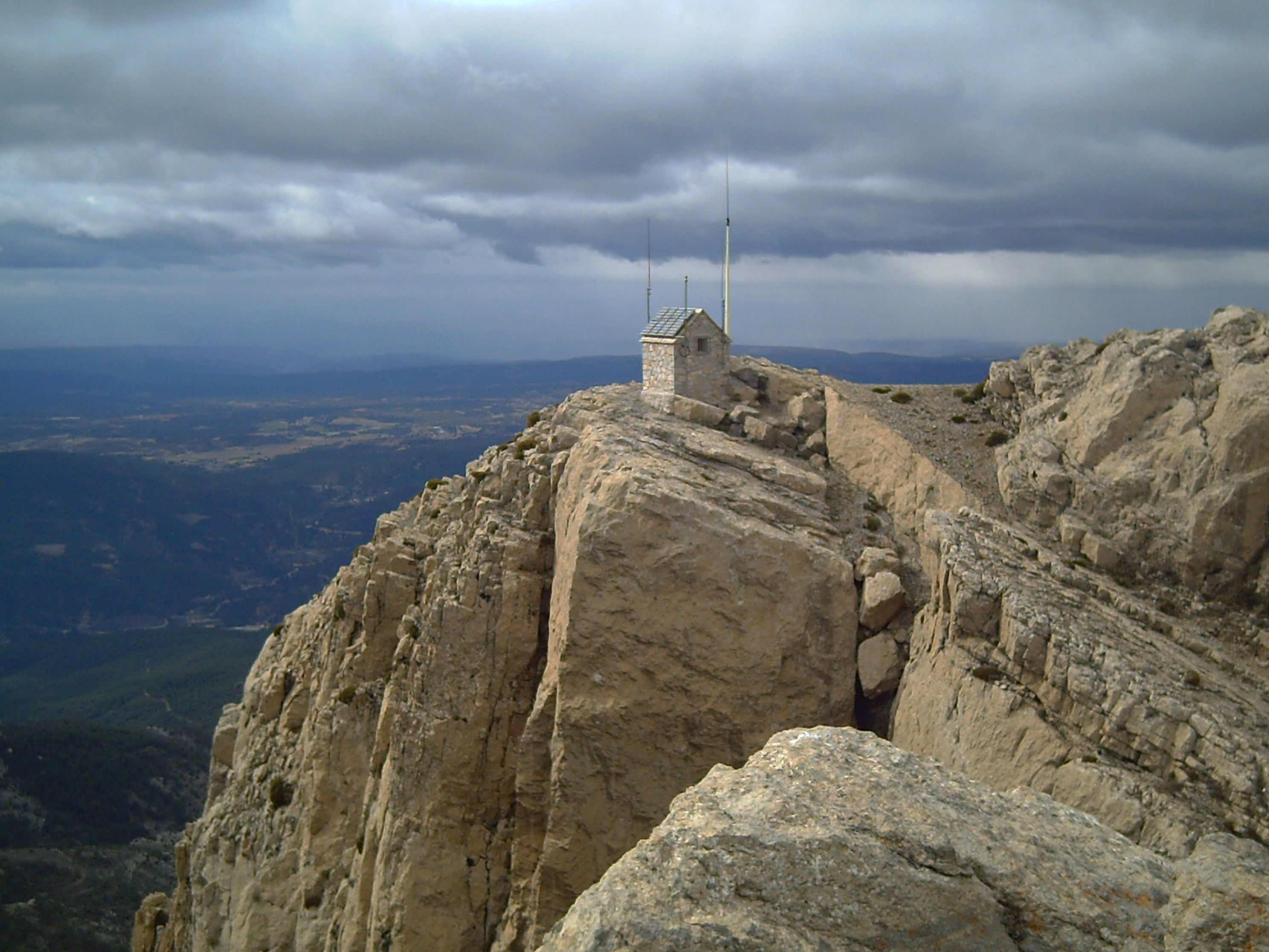 Fotografia presa per mi mateix el 25 de Febrer de 2007